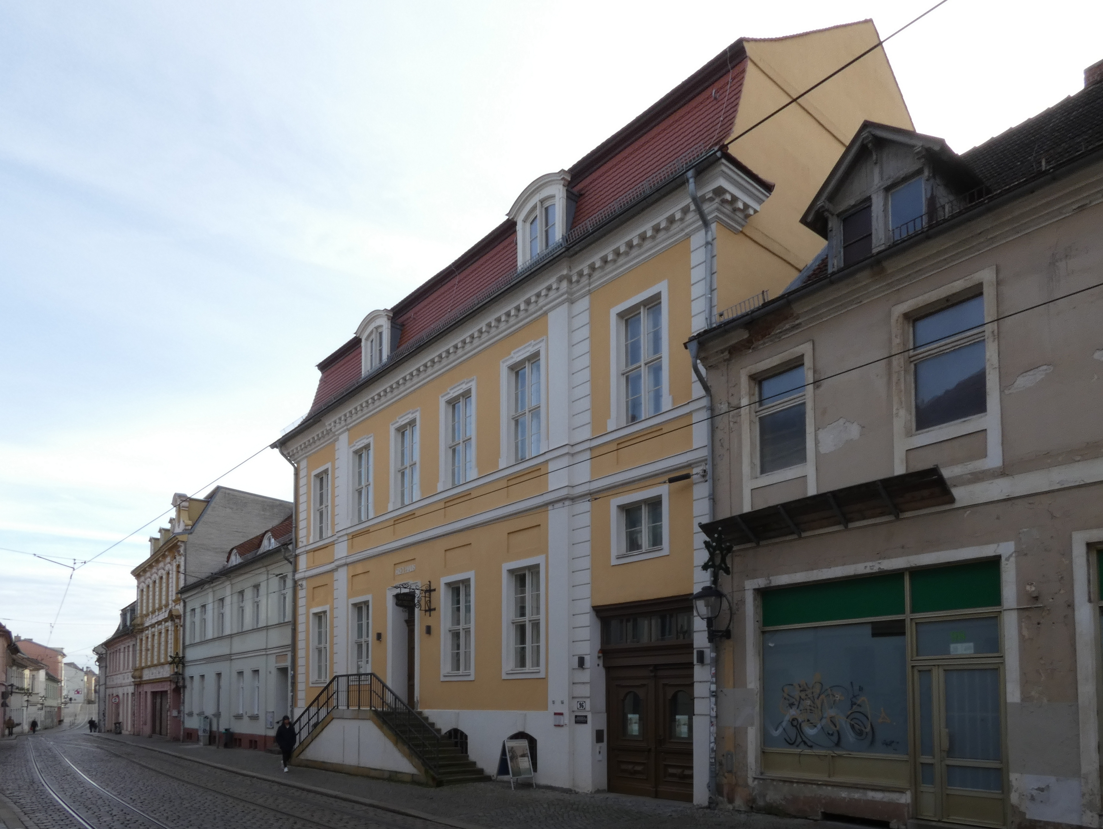 Freyhaus in Brandenburg, Ritterstraße 96